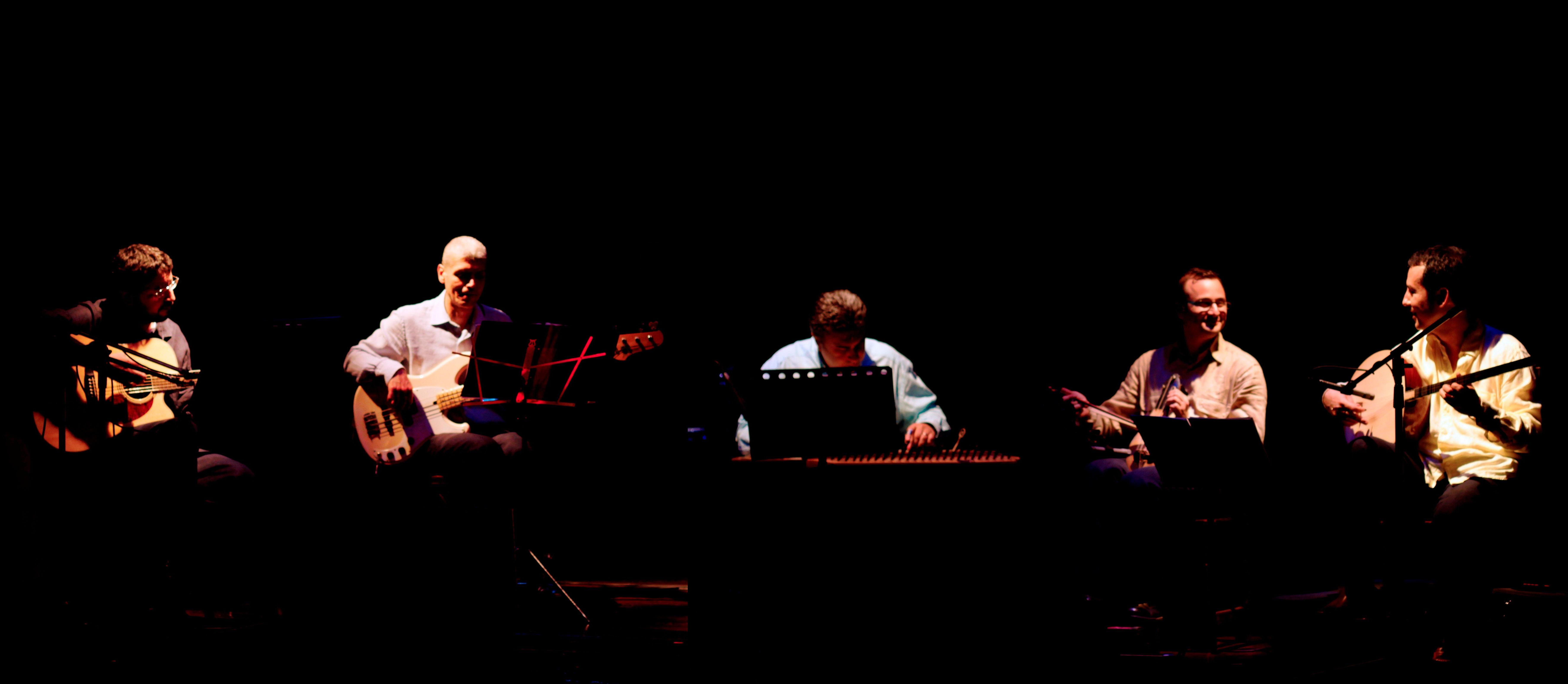 İncesaz konser fotoğrafı. Soldan sağa Cengiz Onural, Akın Aral, Taner Sayacıoğlu, Derya Türkan, Murat Aydemir